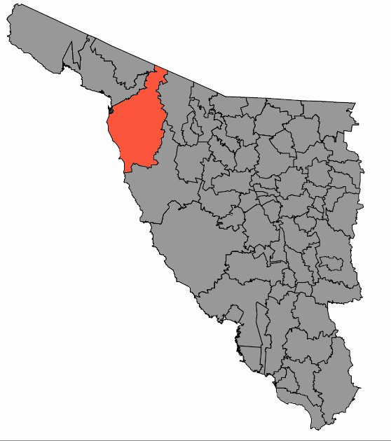 Localizacion de Caborca